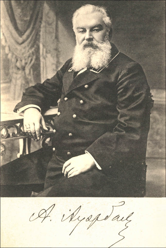 Ауэрбах, Александр Андреевич